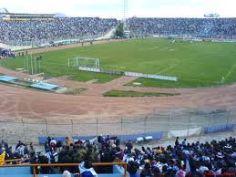 Estadio del equipo local San Jose de Bolivia